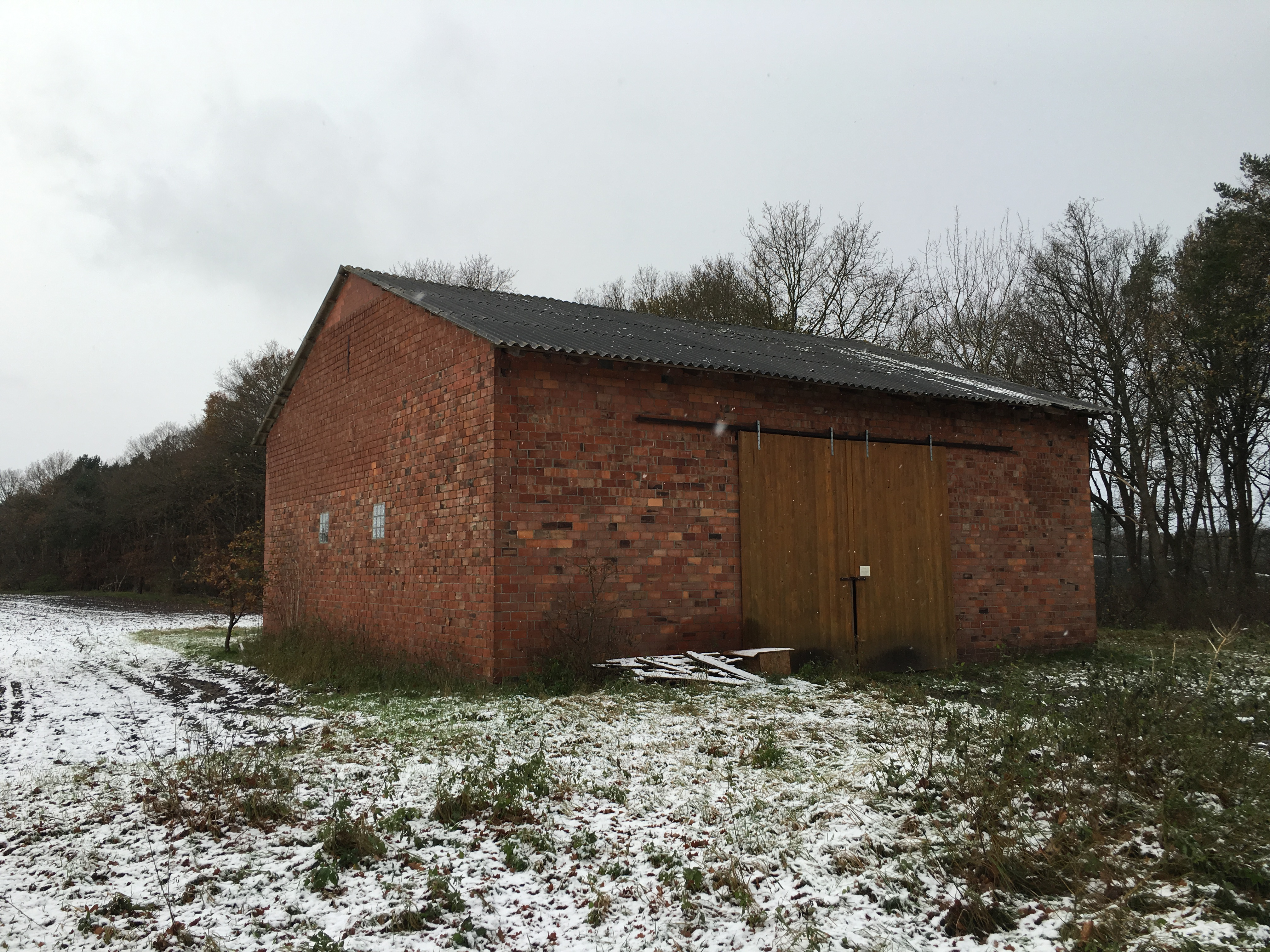 Schüün bi Breddörp